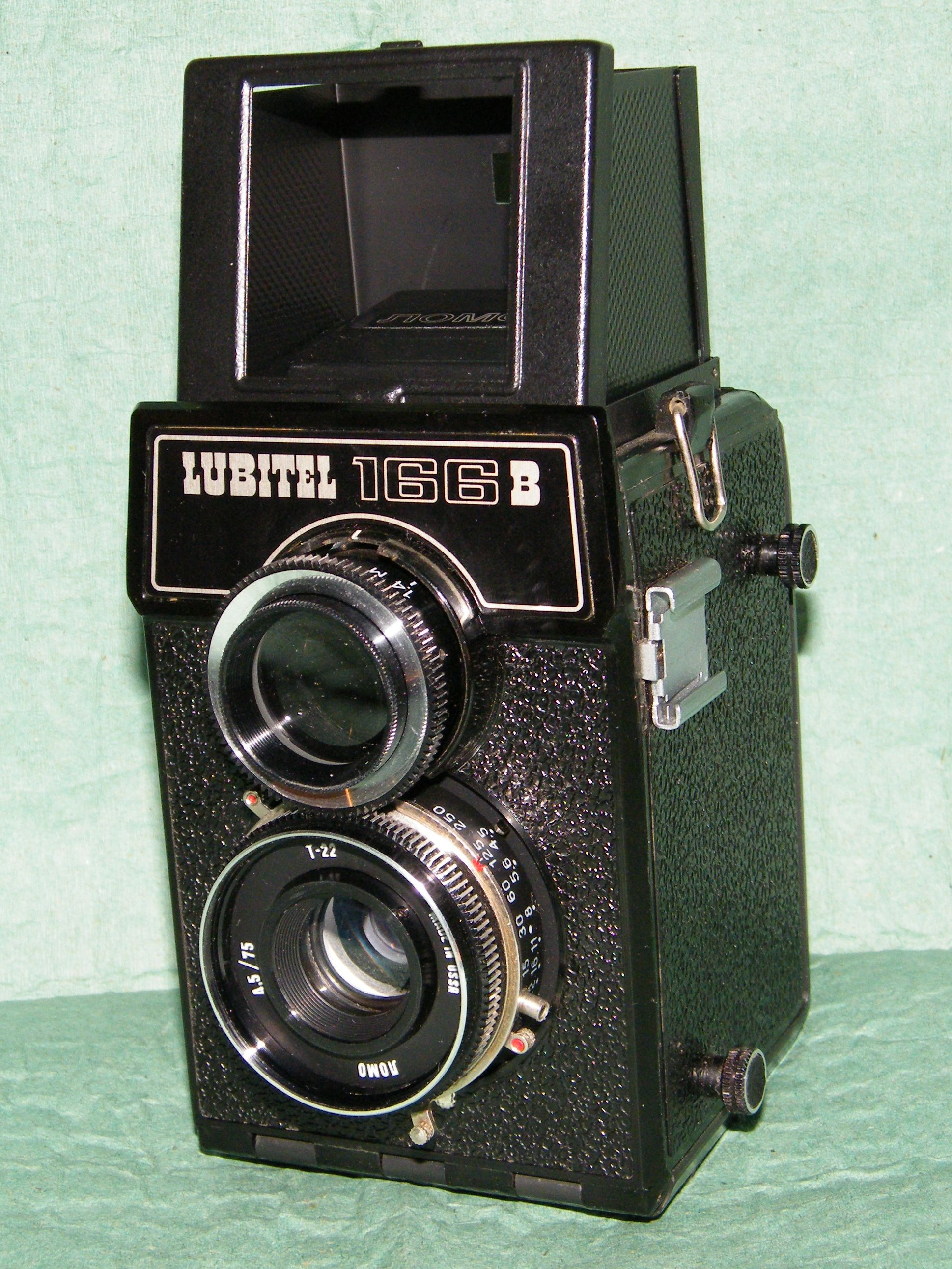 Фотоаппарат Любитель-166В (ЛОМО)